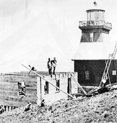 Construction de la la première station de radiotélégraphie maritime de télégraphie sans fil du Canada au phare de Pointe-à-la-Renommée en Gaspésie.